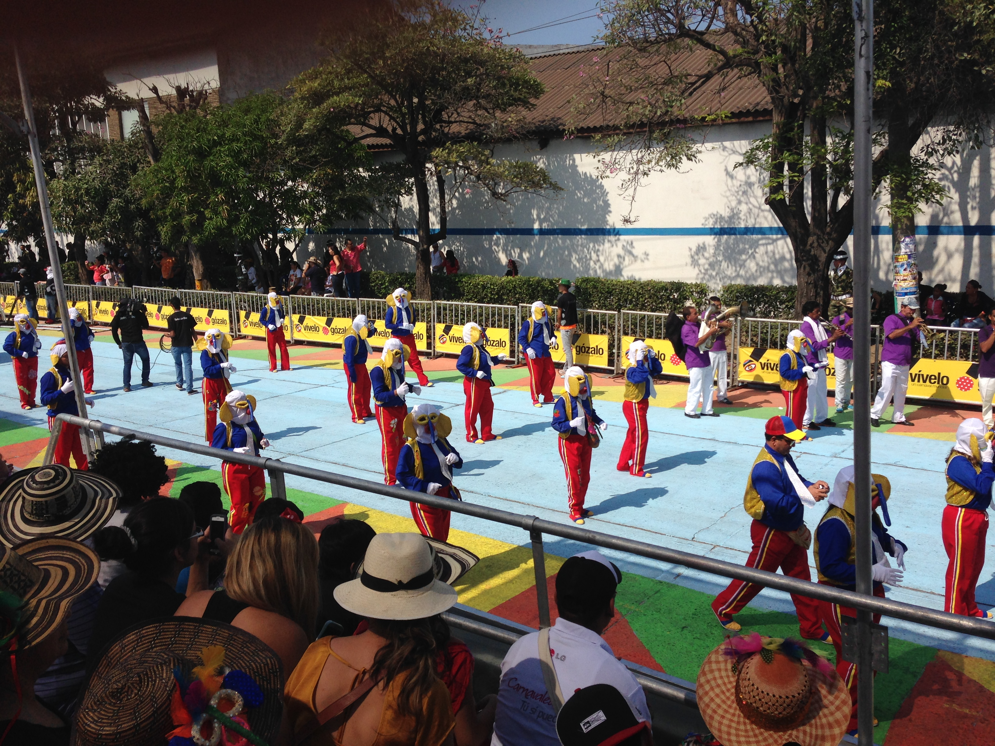 Marimondas en el carnaval de Barranquilla